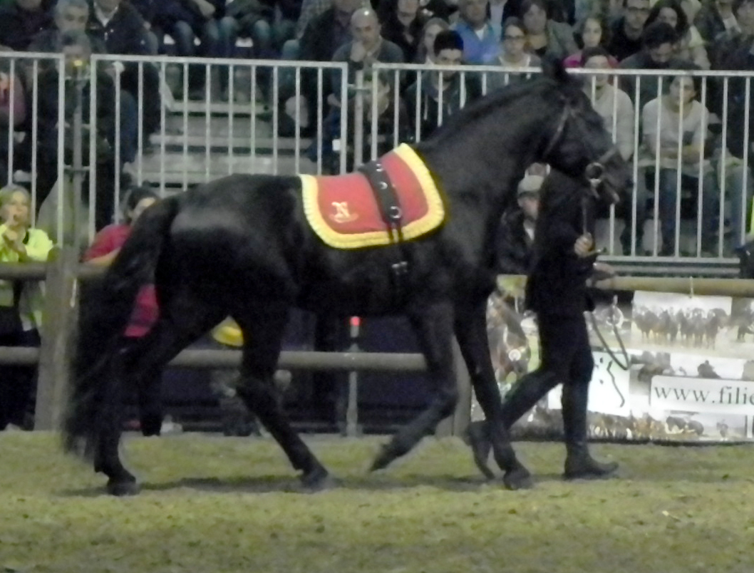 Nobilissimo II, Napoletano stallion, photographed at Fieracavalli, Verona, Italy, on 9 November 2014.